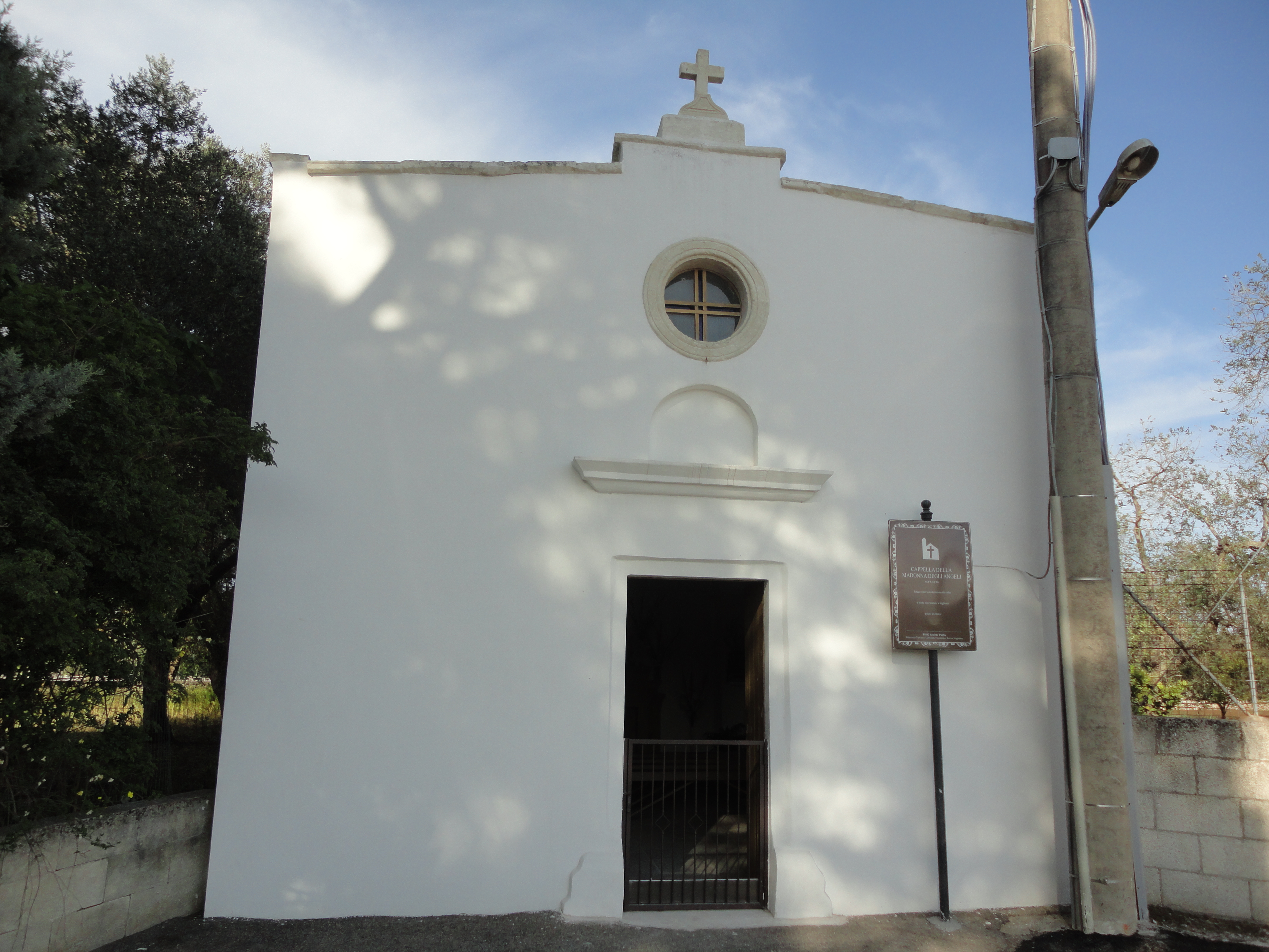 Chiesa santa Maria degli Angeli Corigliano d'Otranto